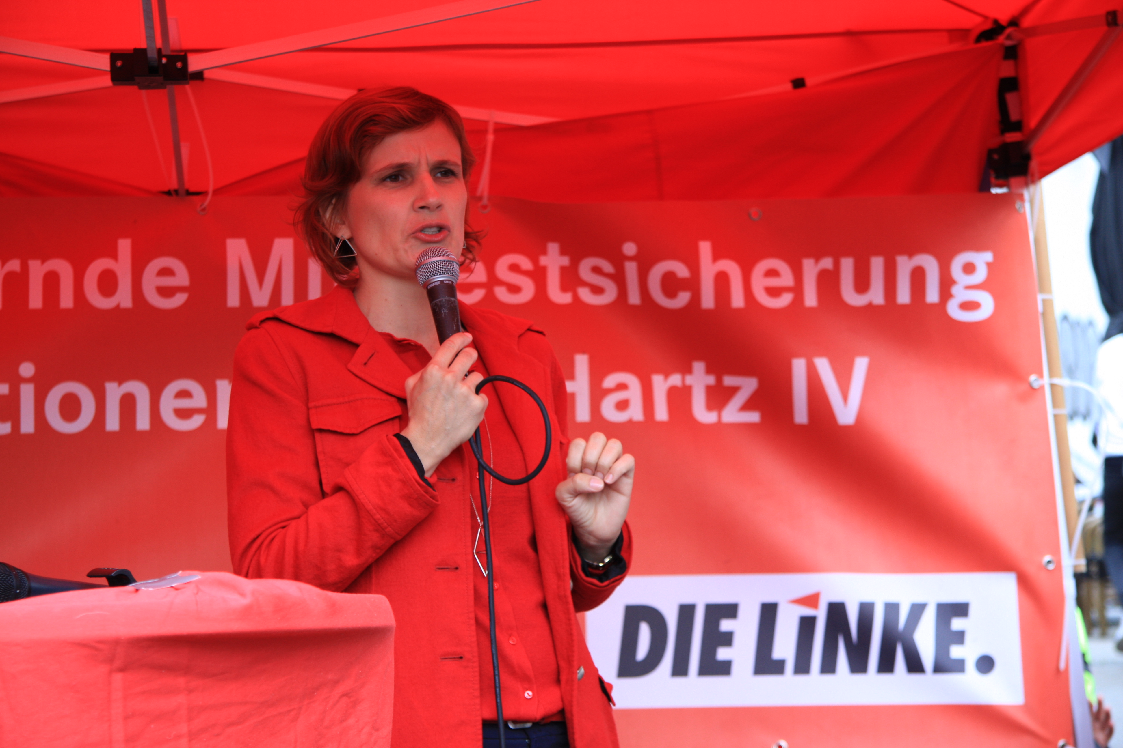 Katja Kipping auf einer Wahlkampfveranstaltung in Kassel